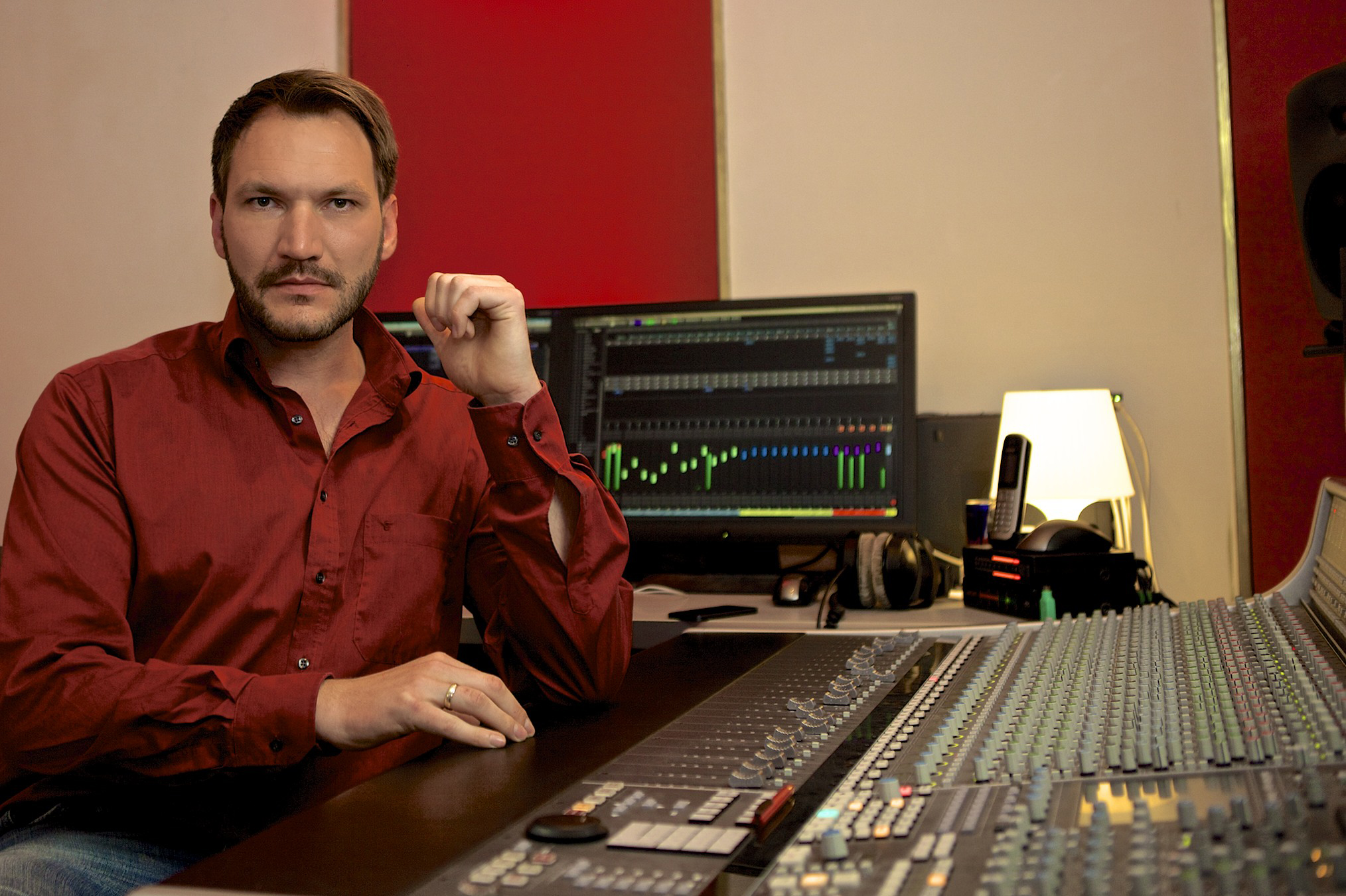 Offizielles Pressefoto von Musikproduzent Hermann Niesig